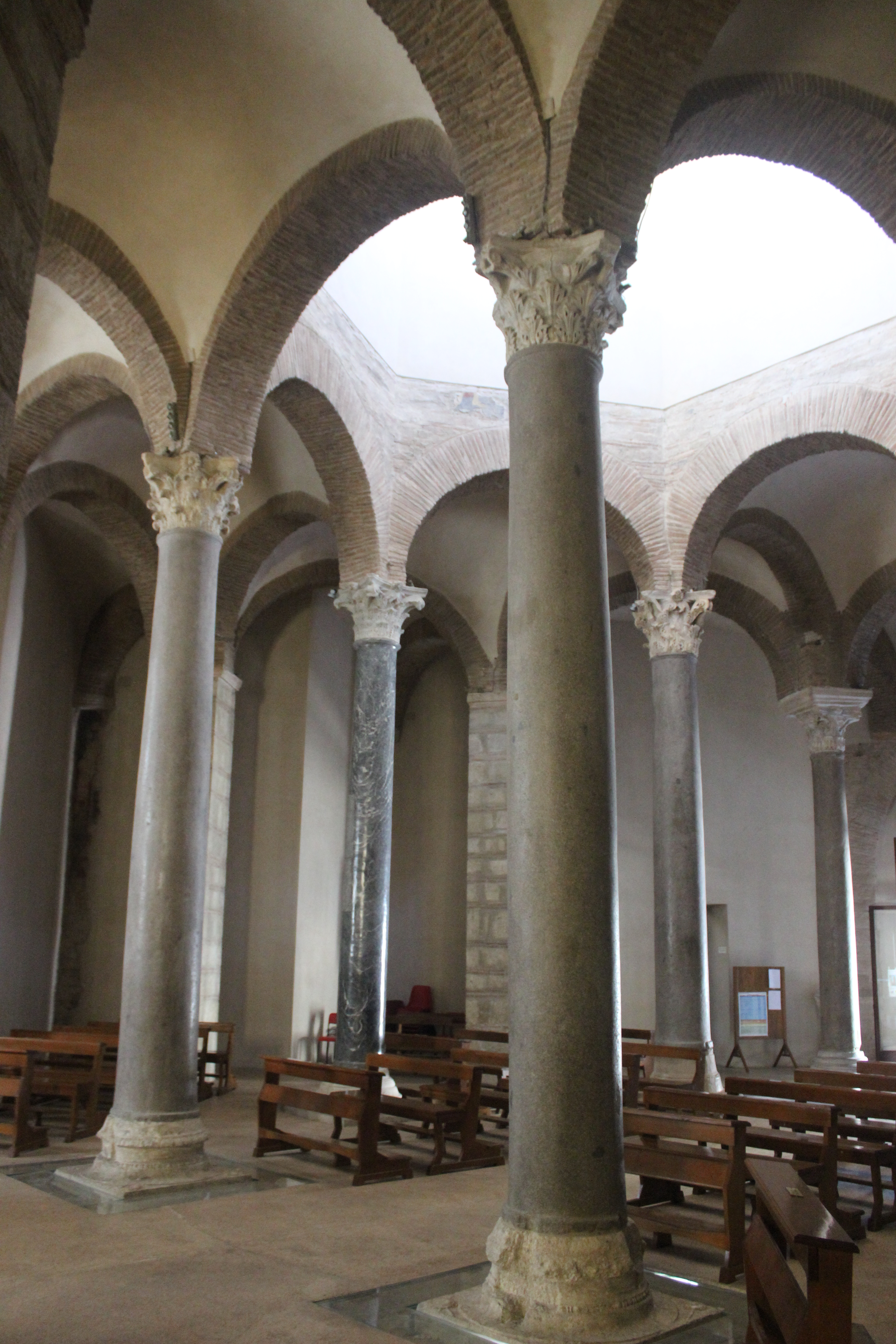 Benevento. Interior de la iglesia de Santa Sofía.